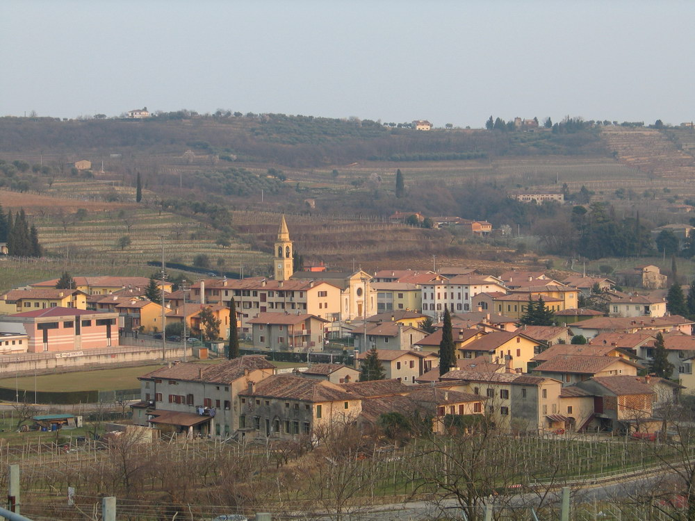 Frazione di Valgatara, comune di Marano di Valpolicella